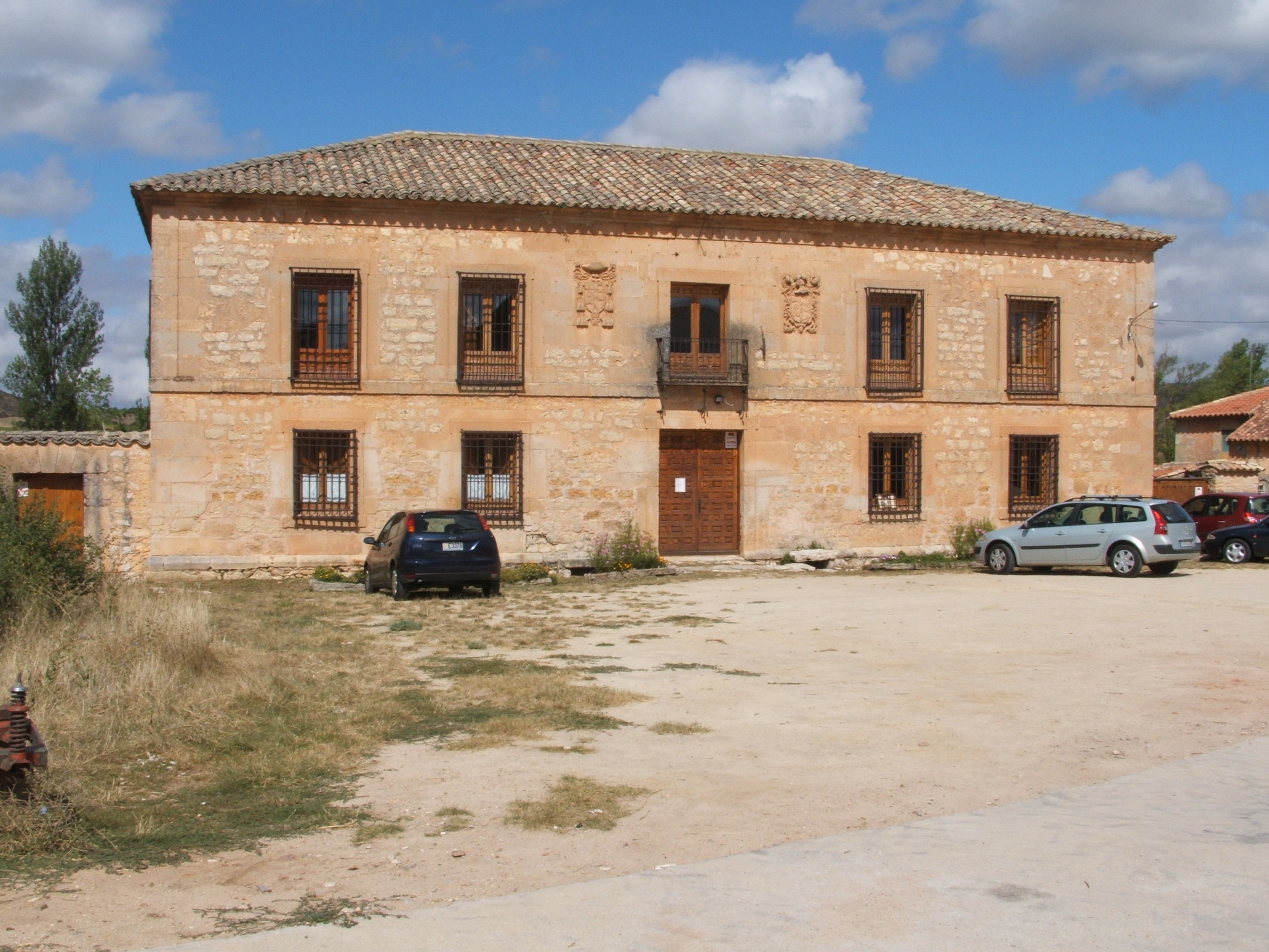 Palacio renacentista de Brias (Soria).